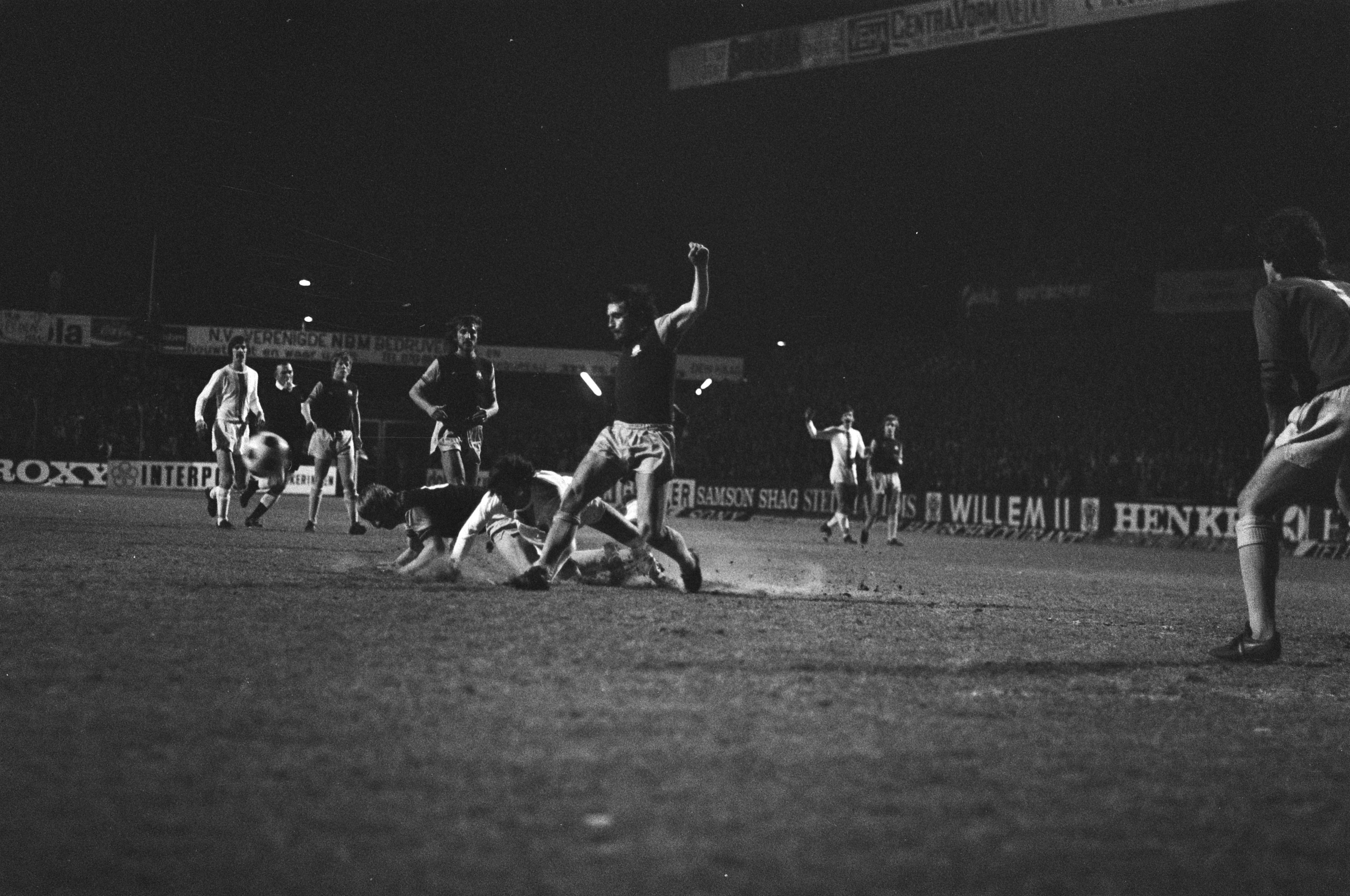 FC Den Haag tegen West Ham United 4-2; Van Vliet (op de grond) is onderuitgehaald